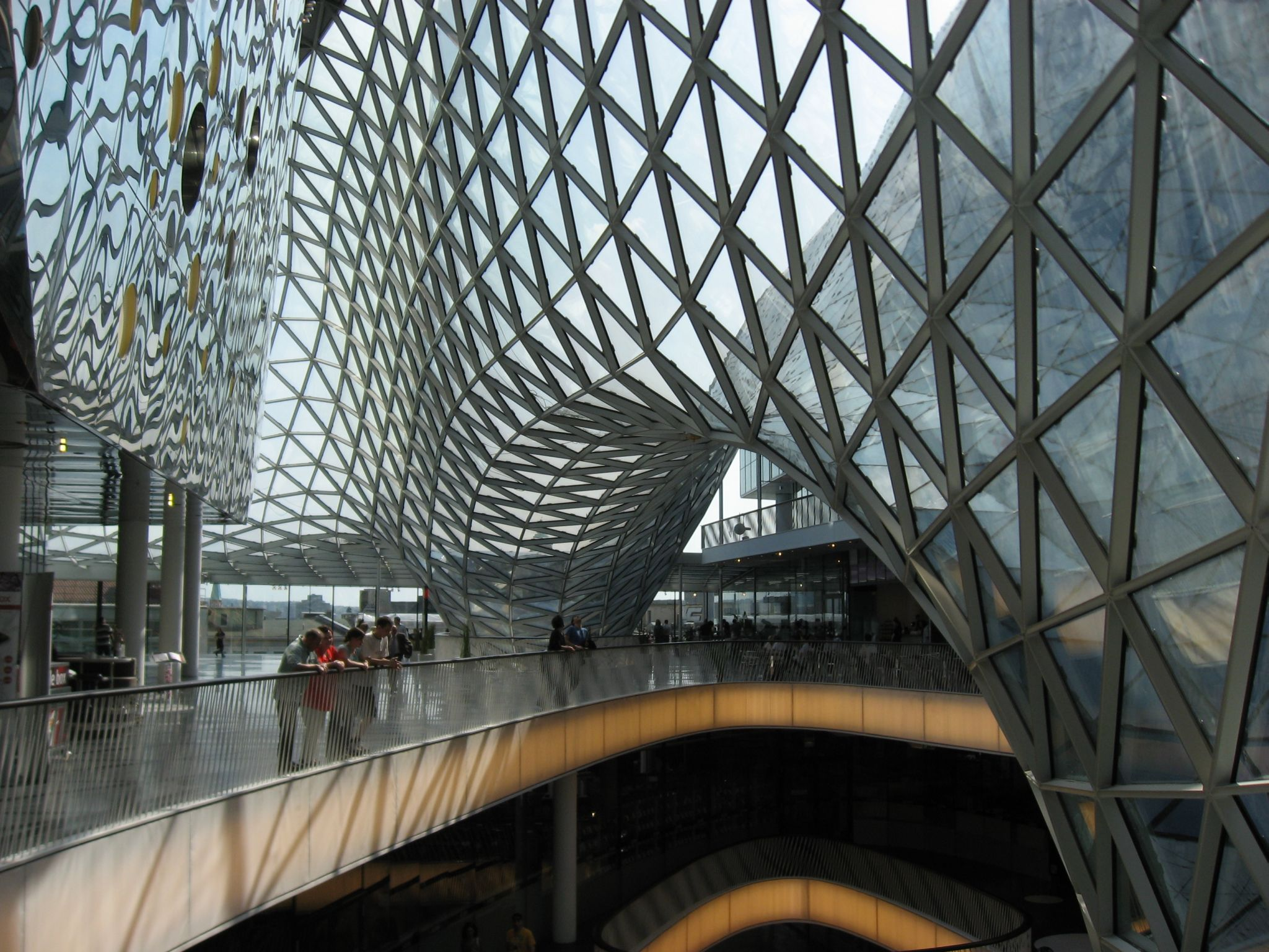 MyZeil